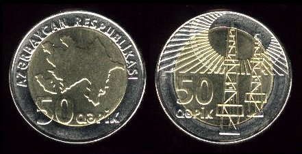 50 gopik